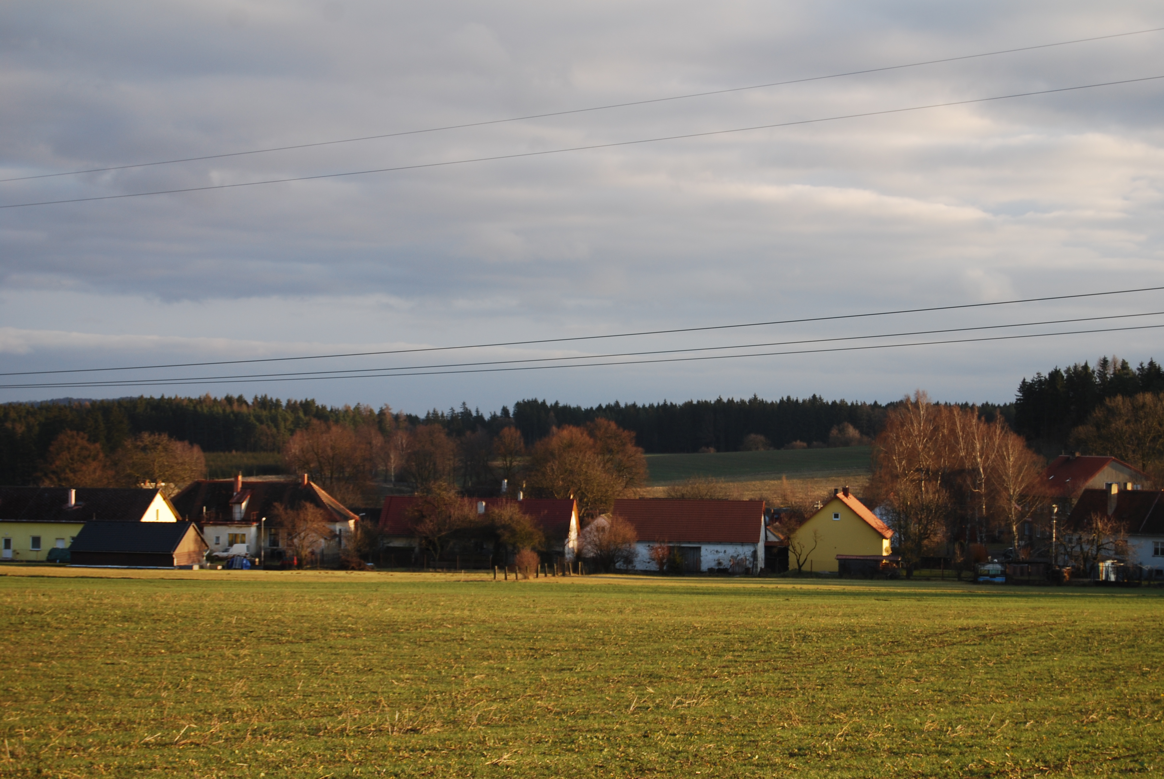 Pohled na obec ve směru od Hrazan. Hrazánky (Hrazany). Okres Písek. Česká republika.